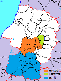 寒河江荘及び長井荘